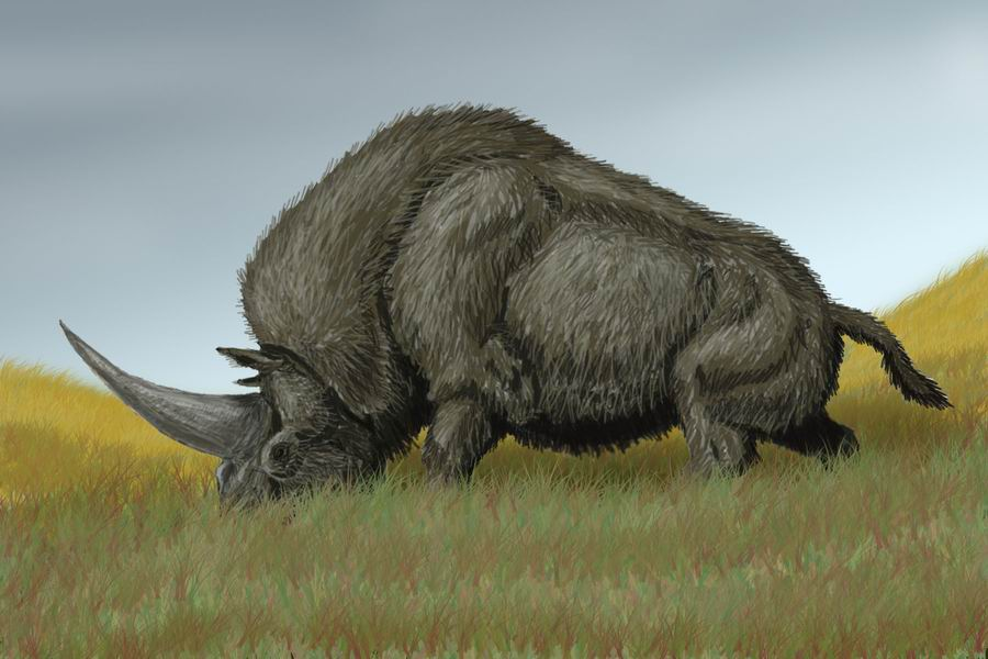 Elasmotherium sibiricum, autor - Bogdanov,2006